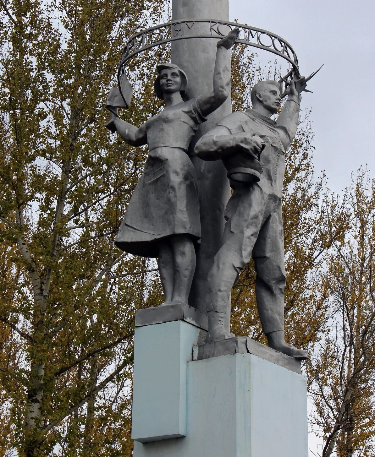 Монумент «Слава покорителям космоса». (Скульптура женщины и мужчины в скафандре со шлемом в руке, стоящие около ракеты и стремящиеся ввысь) Рыбинск. Микрорайон Волжский